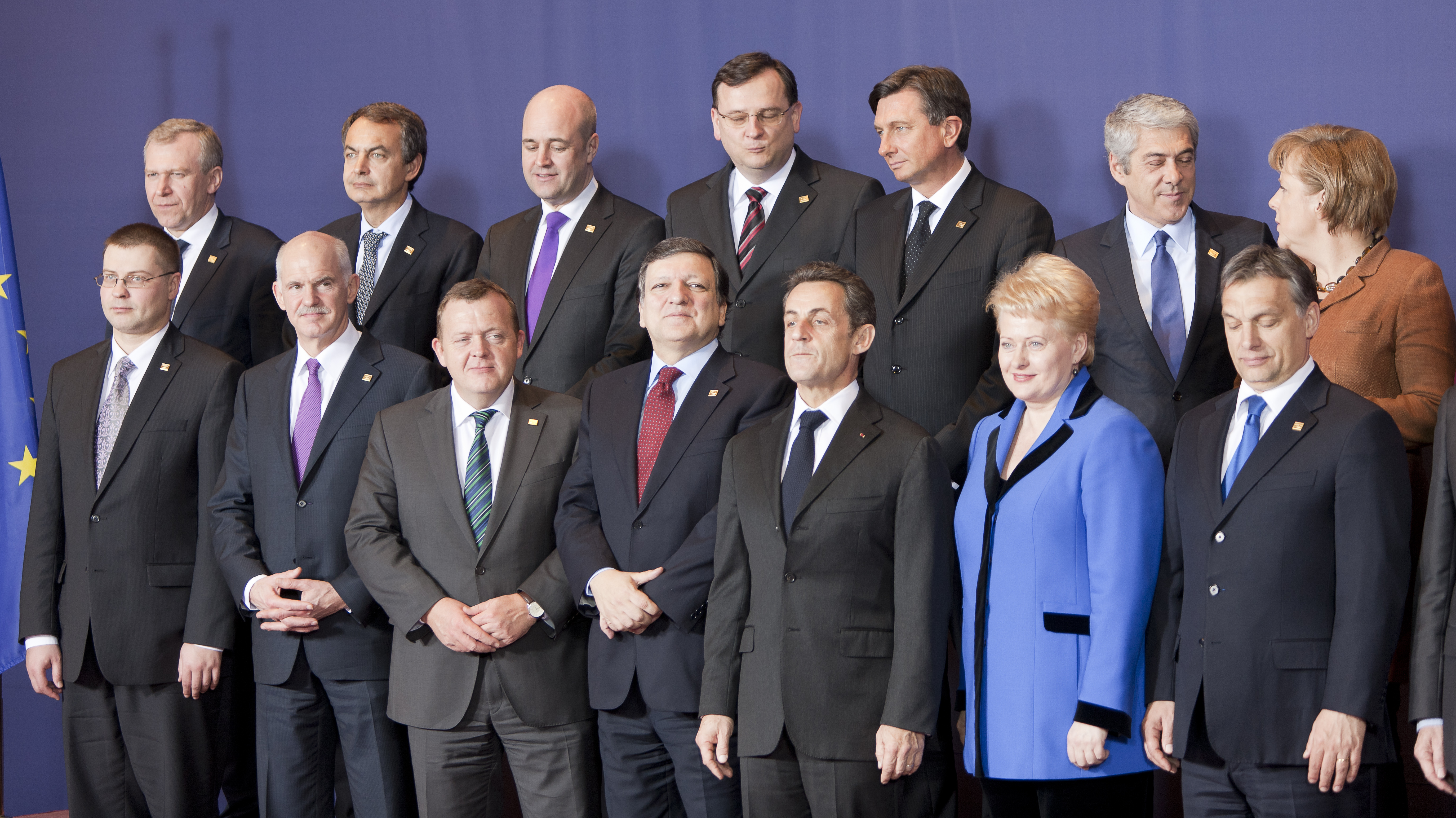 Eiropas Savienības (ES) valstu un valdību vadītāji Eiropadomes sanāksmē Briselē, 24.03.2011.